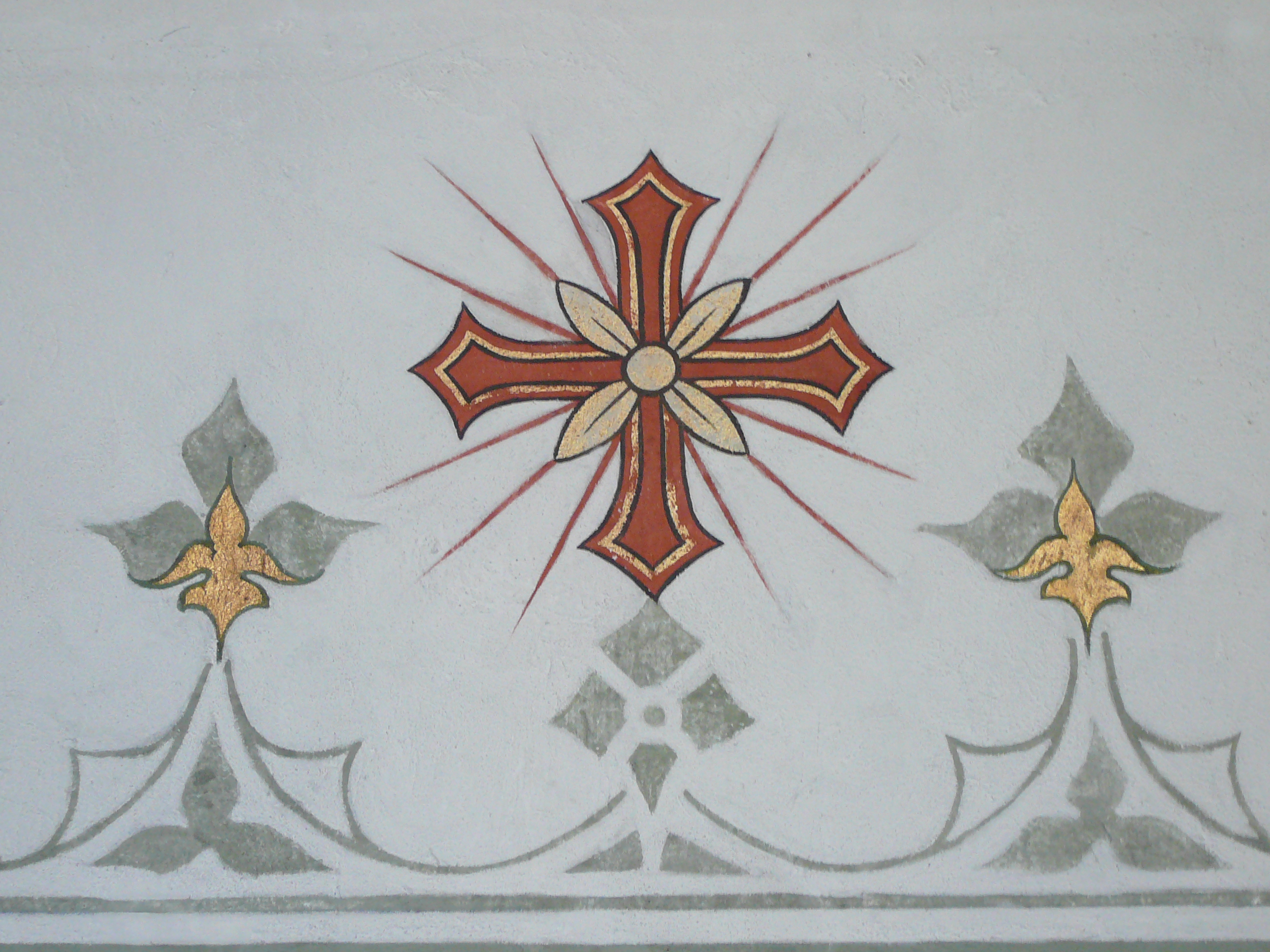 Dreifaltigkeitskirche Bülach Blick, Bemalung von 1909